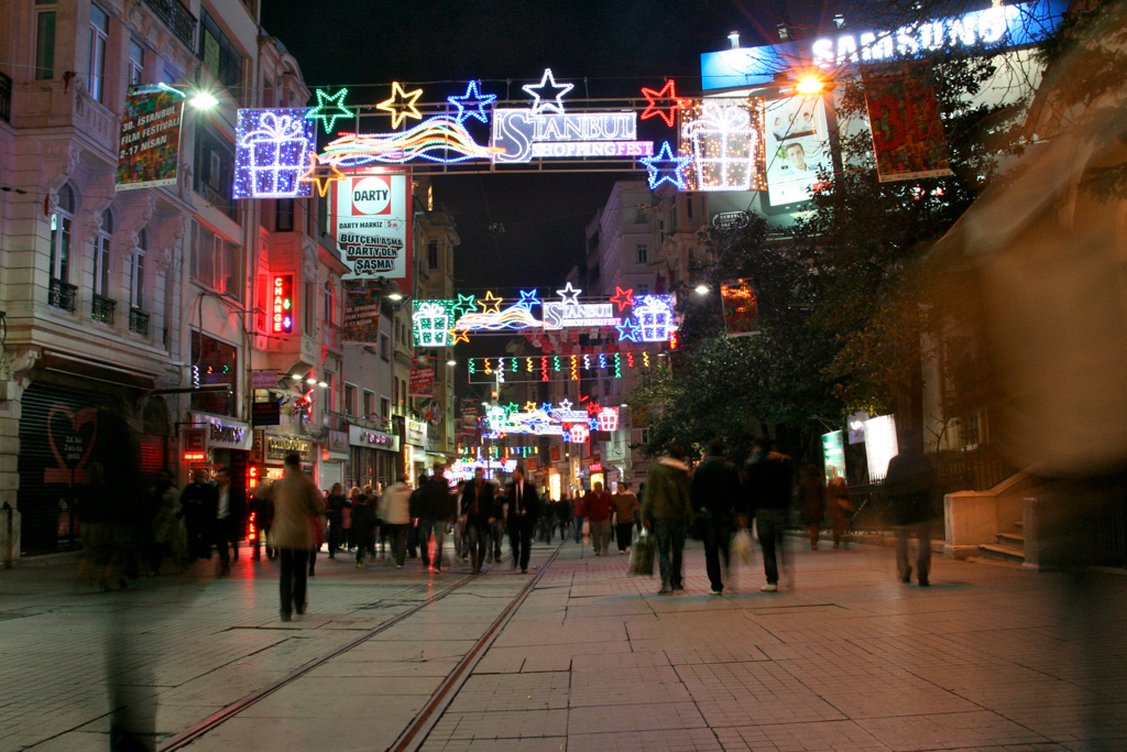 İstiklal Avenue, Istanbul, Turkey